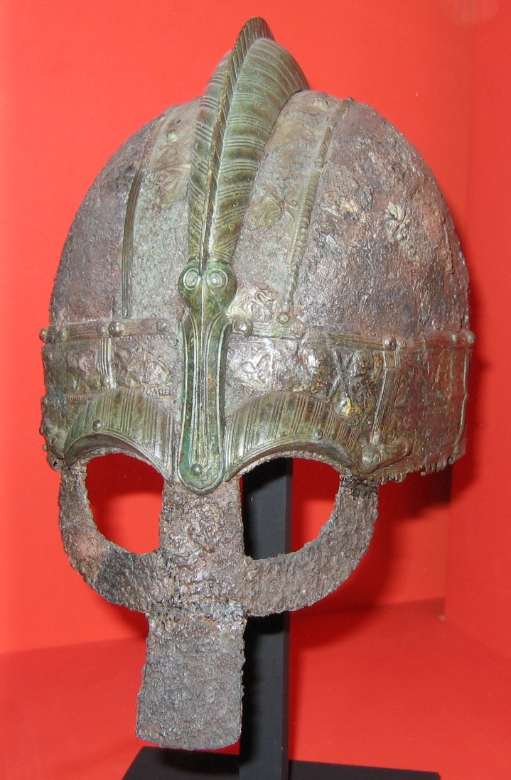 Vendel 12 helmet